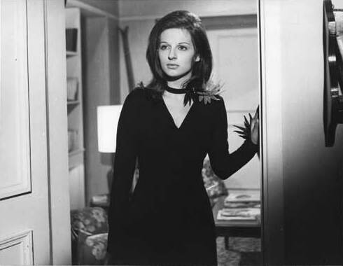 Fotografía blanco y negro, sobre papel fotográfico brillante. Escena en un interior, con la actriz Cristina Alberó. La misma se halla de pie y de medio cuerpo, en el vano de una puerta, apoyando su mano izquierda, sobre el marco de la abertura.